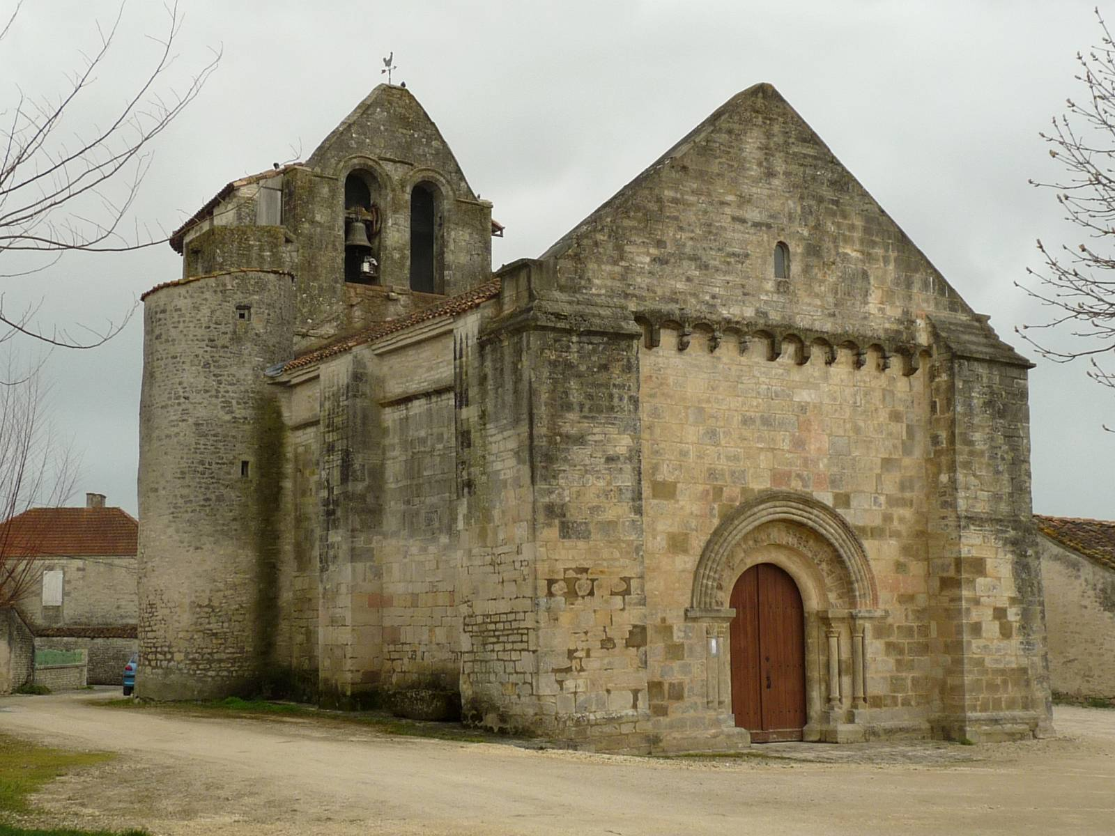 église de Brie-sous-Matha, Charente-Maritime, France